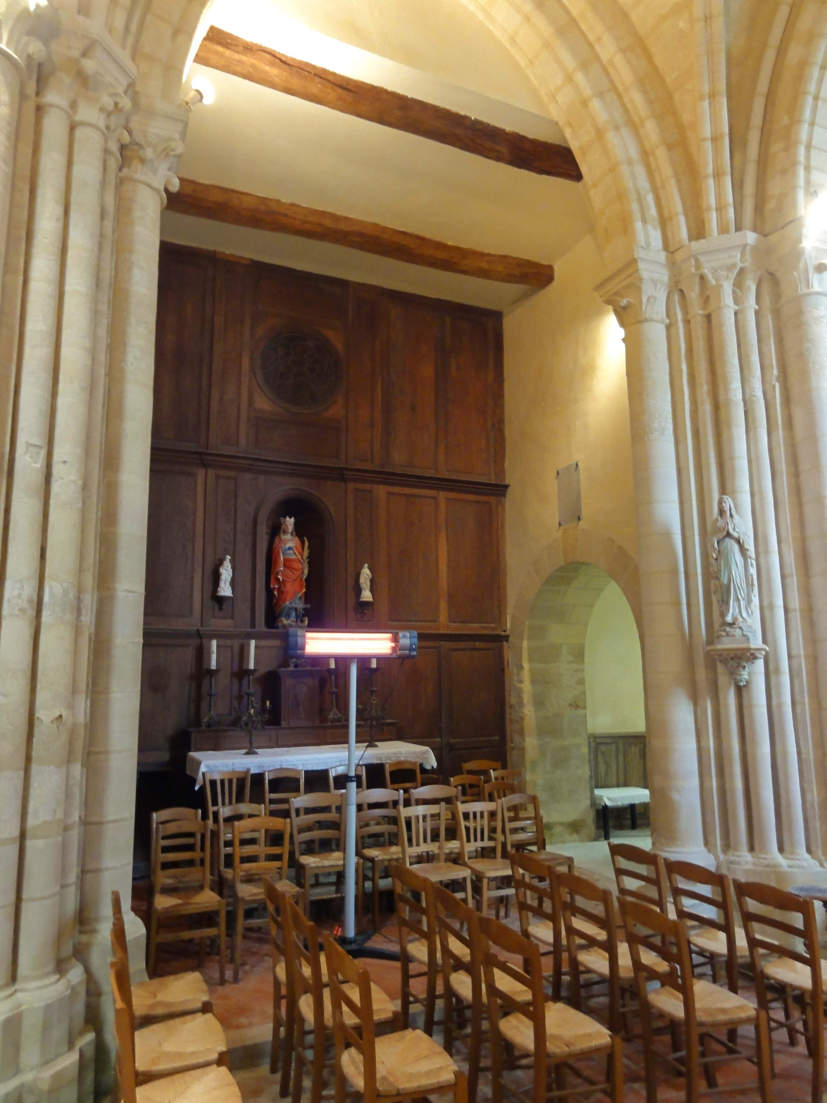 Intérieur de l'église - voir titre.